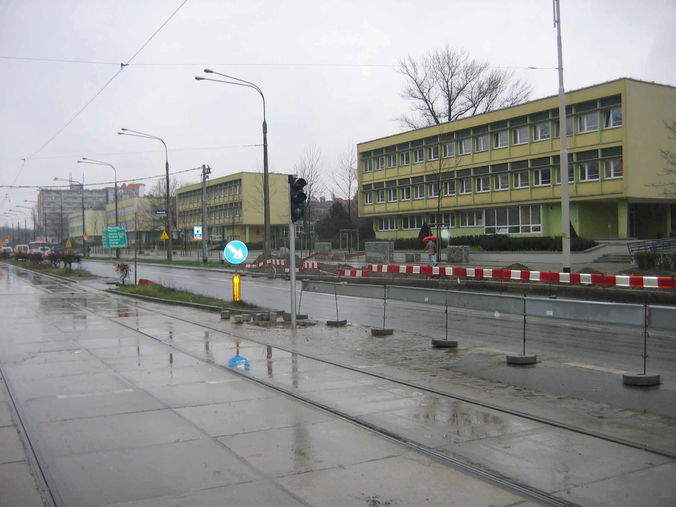 Kliniki Wydzialu medycyny weterynaryjnej UP we Wroclawiu